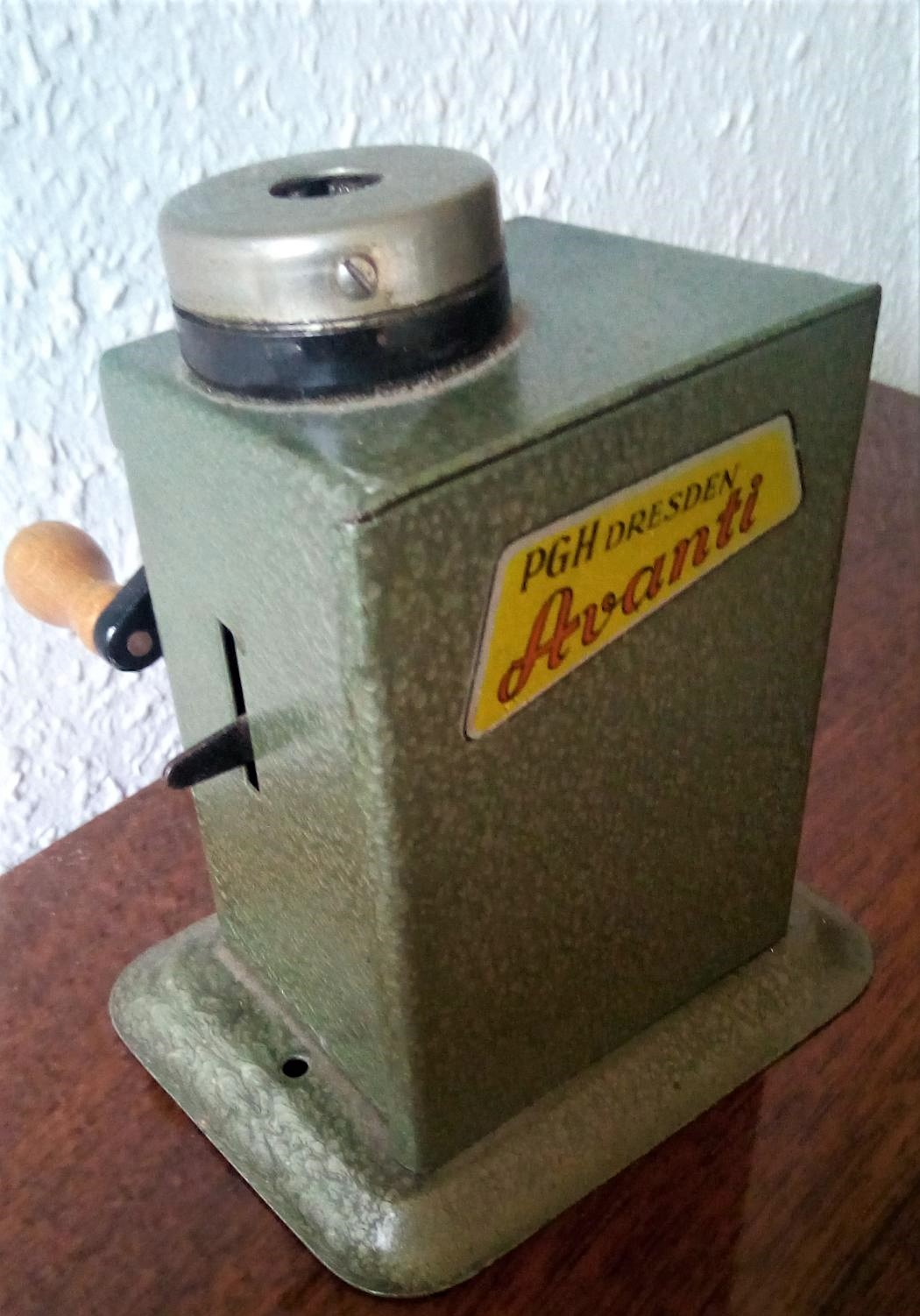 Der Bleistiftspitzer wurde von Emil Grantzow 1908 entwickelt und zuletzt in den 1960er Jahren von der DDR-Firma PGH Dresden produziert und vertrieben.